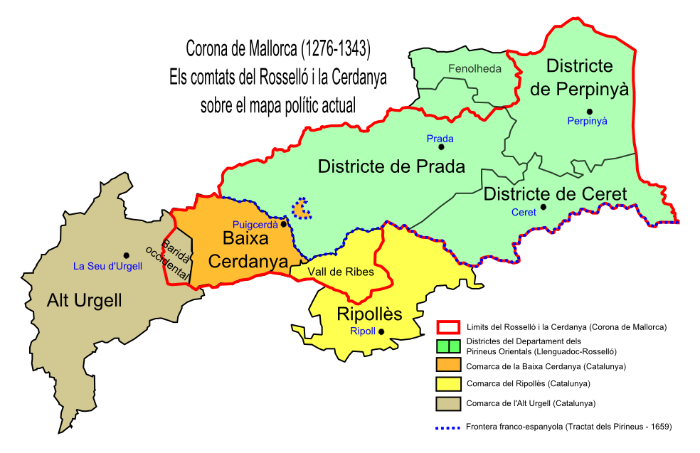 Els antics comtats del Rosselló i la Cerdanya sobre el mapa polític actual del Departament dels Pirineus Orientals i les comarques de la Baixa Cerdanya i el Ripollès.